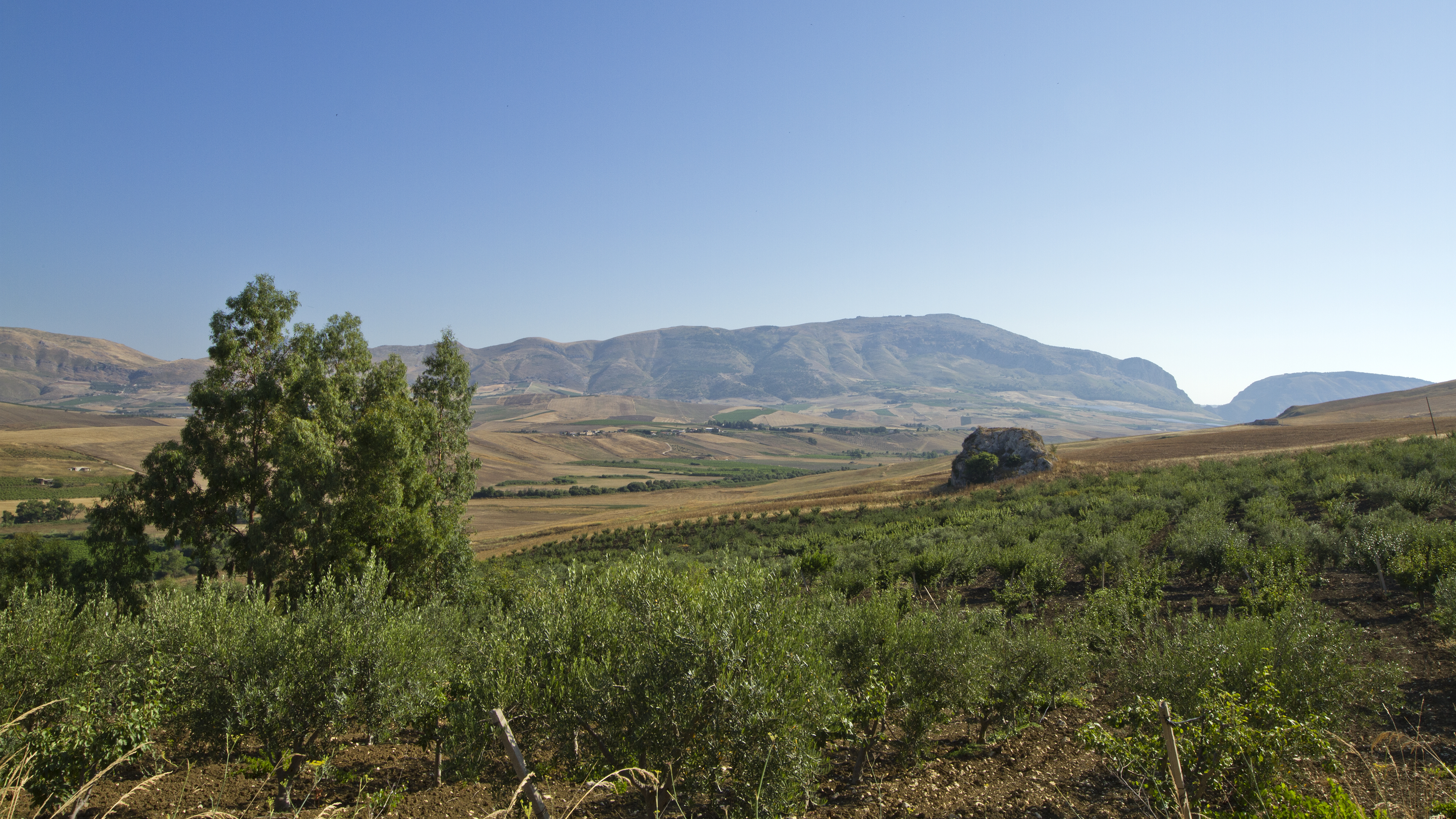 Monte della Fiera